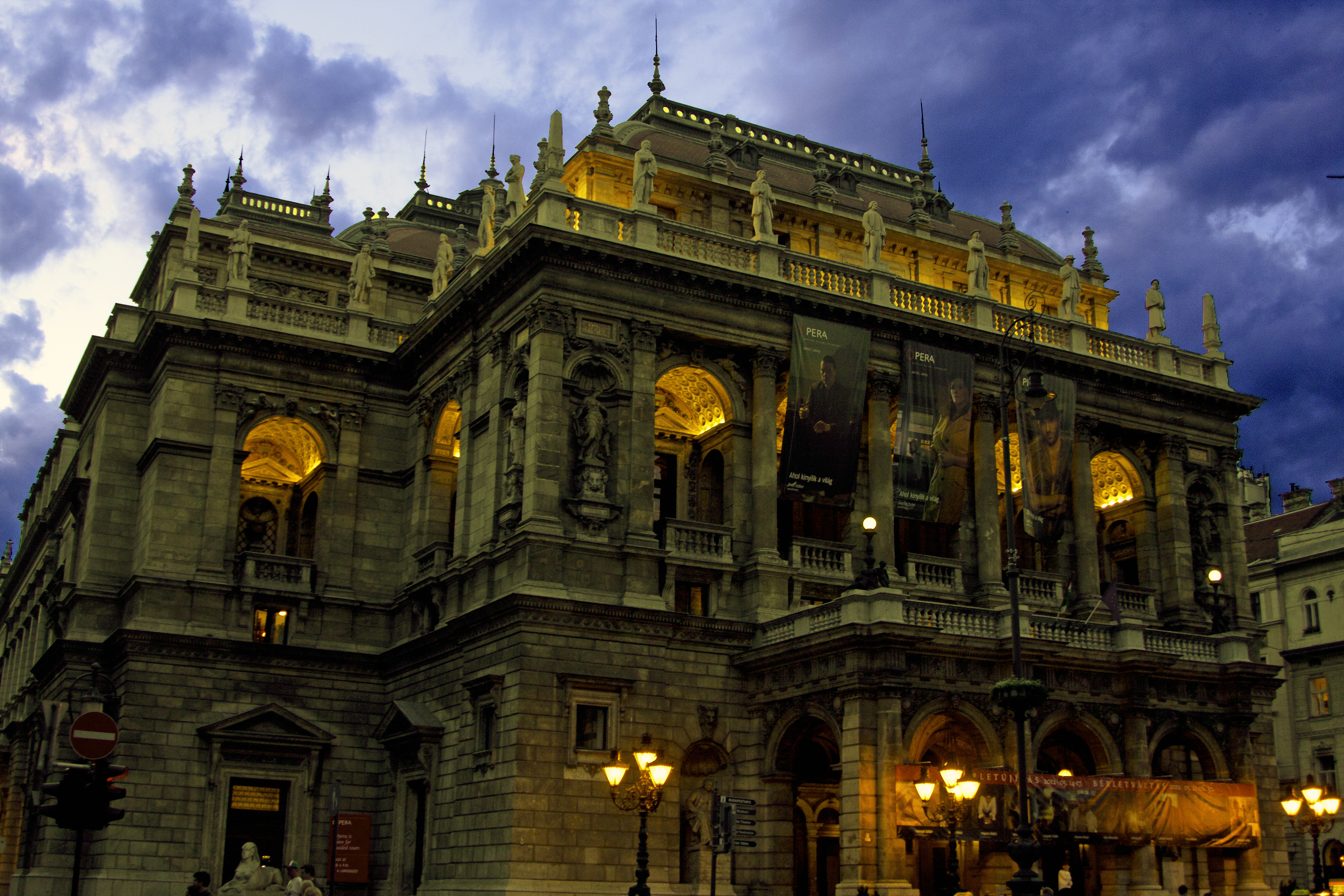 Magyar Állami Operaház This is a photo of a monument in Hungary. Identifier: 695